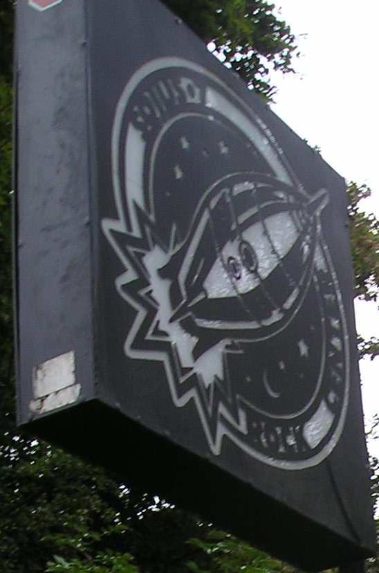 Logo des Sojus, Monheim am Rhein